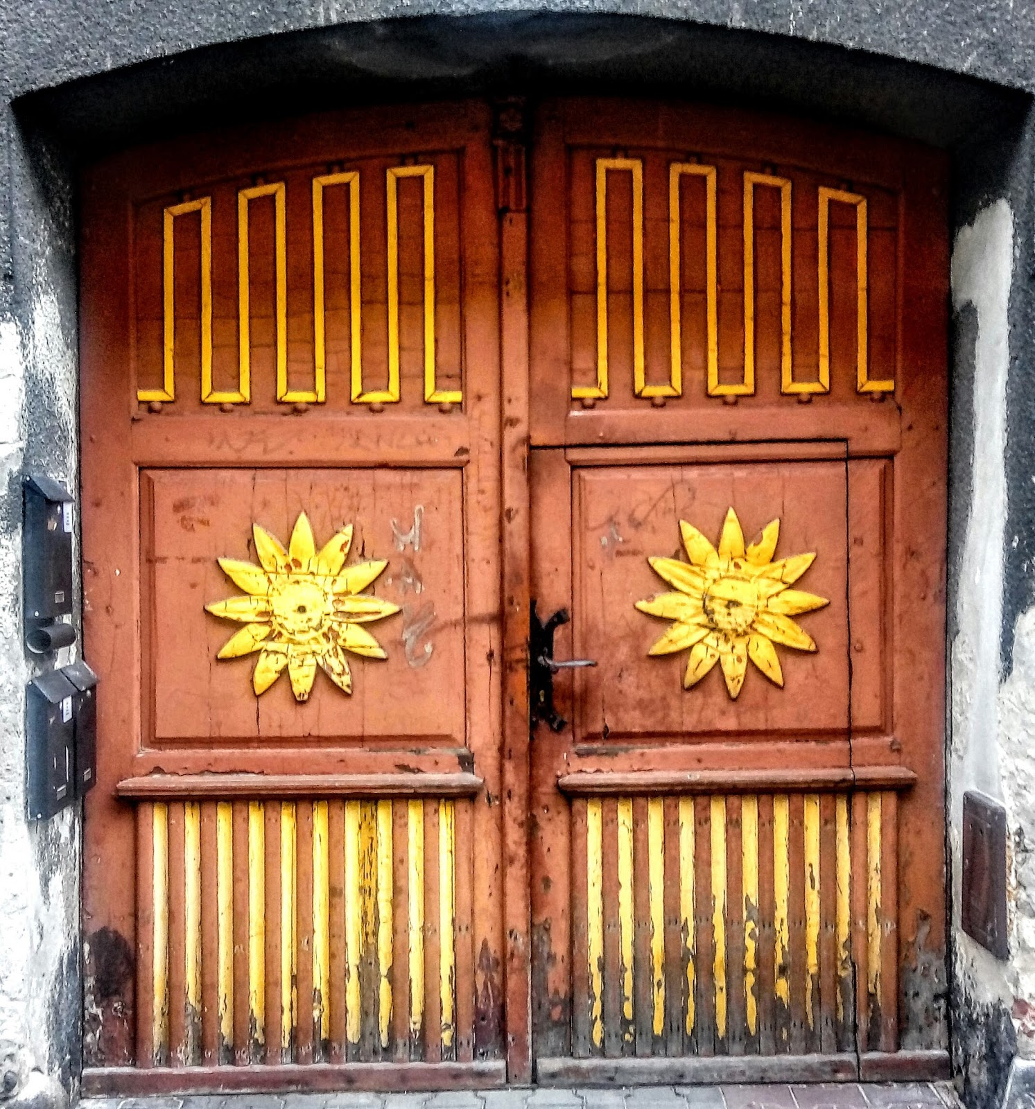 Rybnik